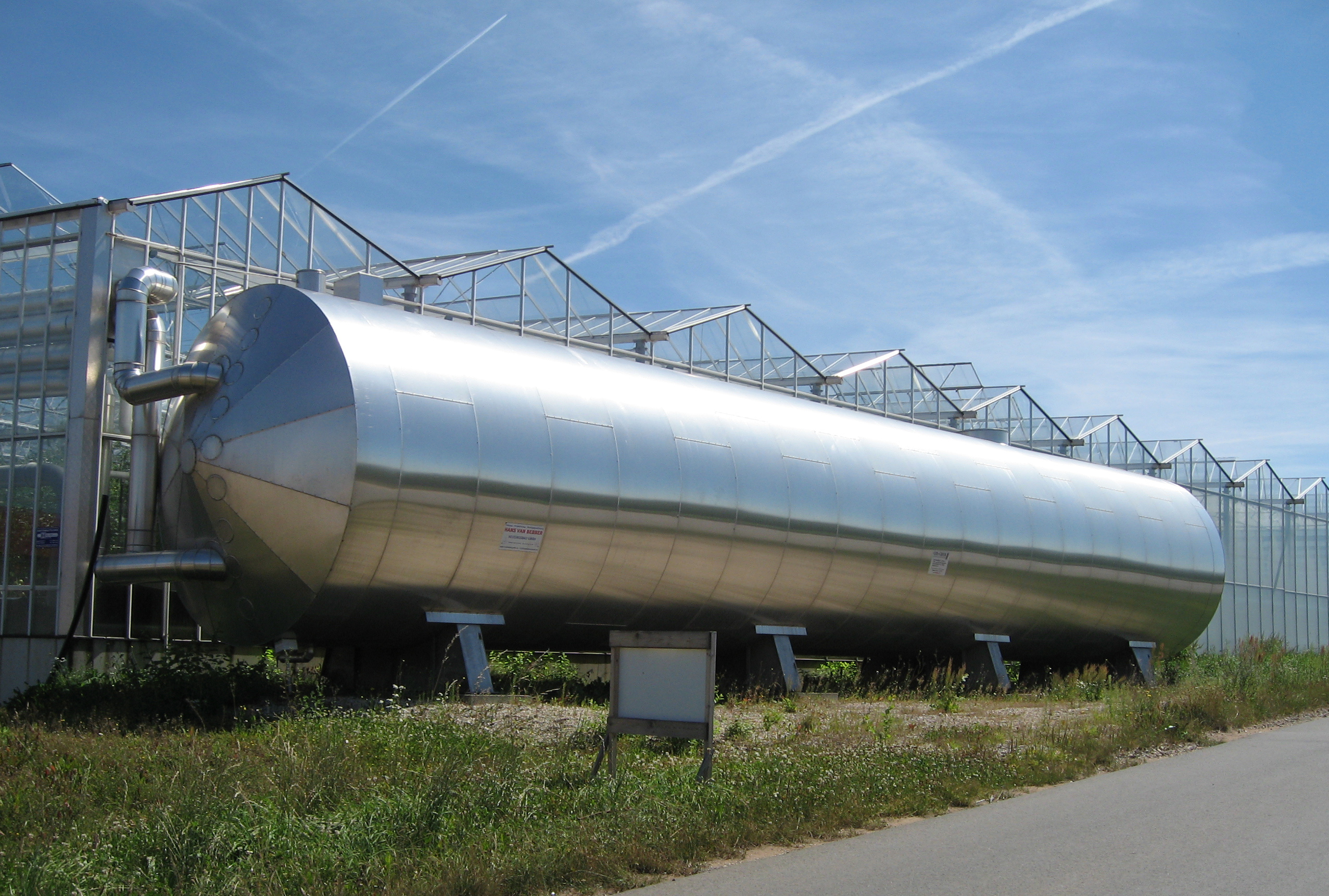 Puffer - Heißwasserspeicher für Gewächshausanlage mit 150 m³ Volumen, Standort Nürnberg Schnepfenreuth